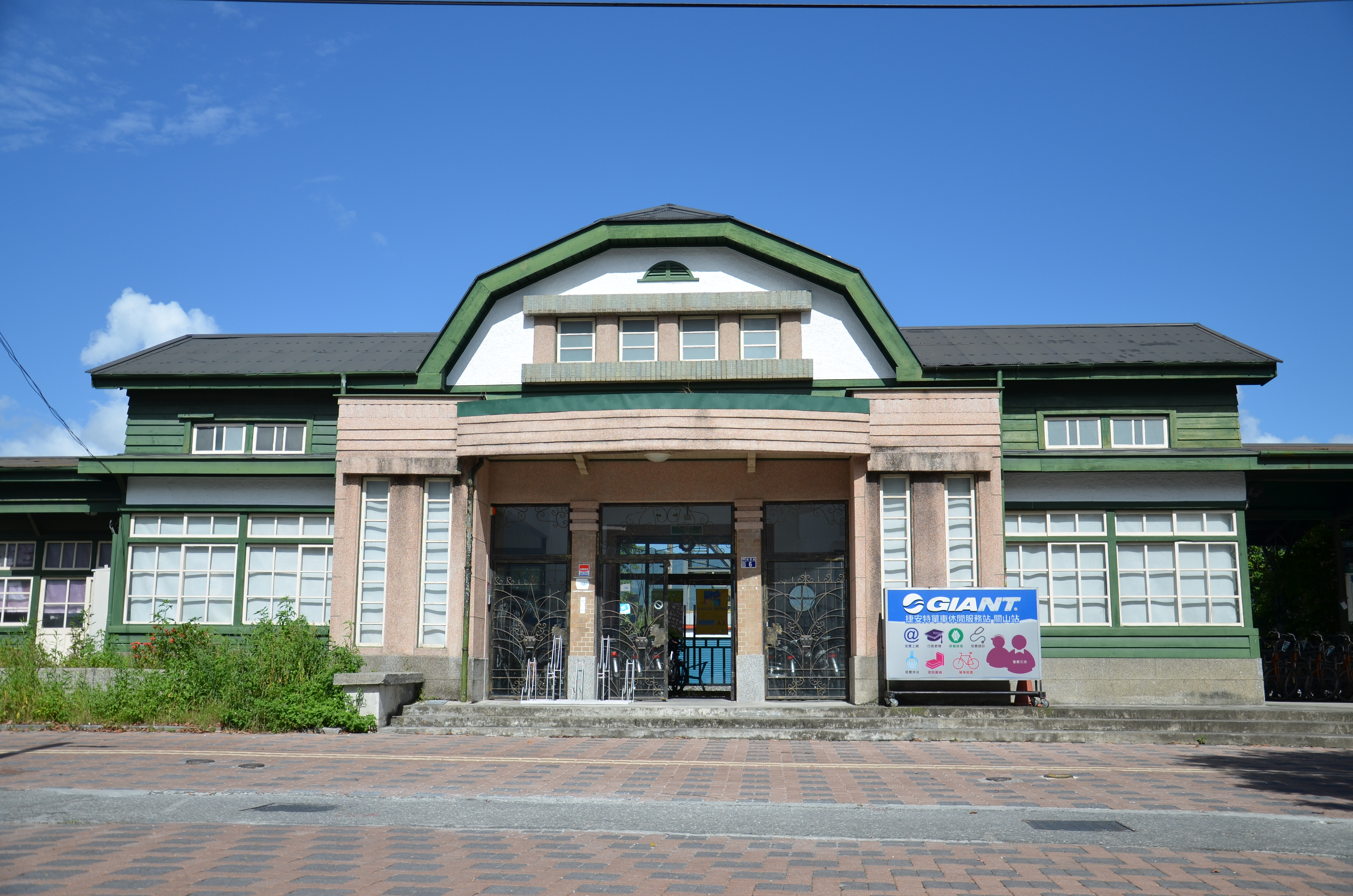 舊關山車站。